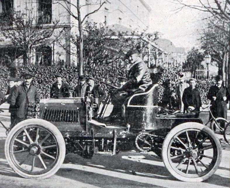 Étienne Giraud, vainqueur du Critérium de l'Alcool Paris-Rouen 1900, sur Panhard 22 hp - Le Sport universel illustré du 3 novembre 1900, p. 703